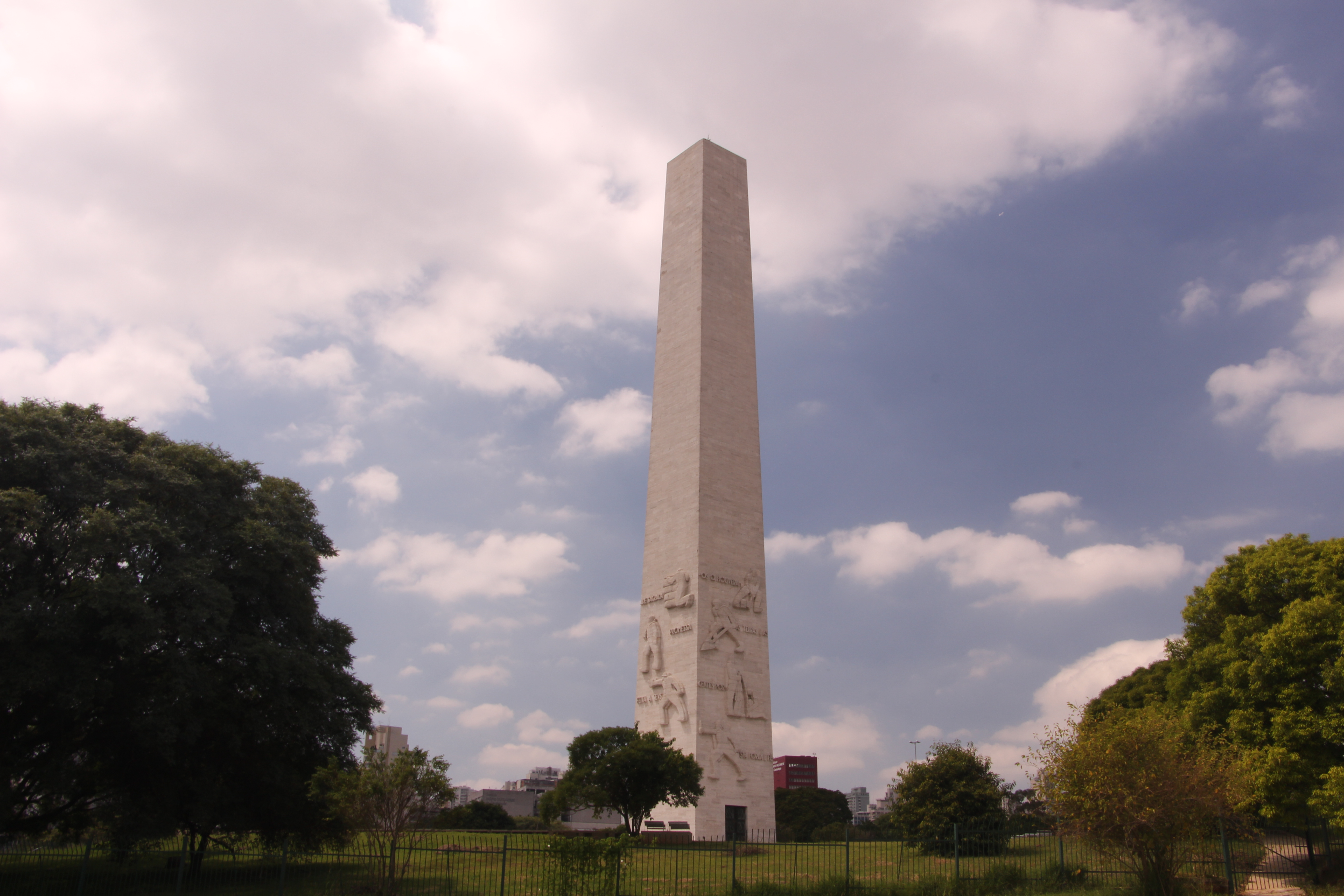 Mausoléo Heróis de 32